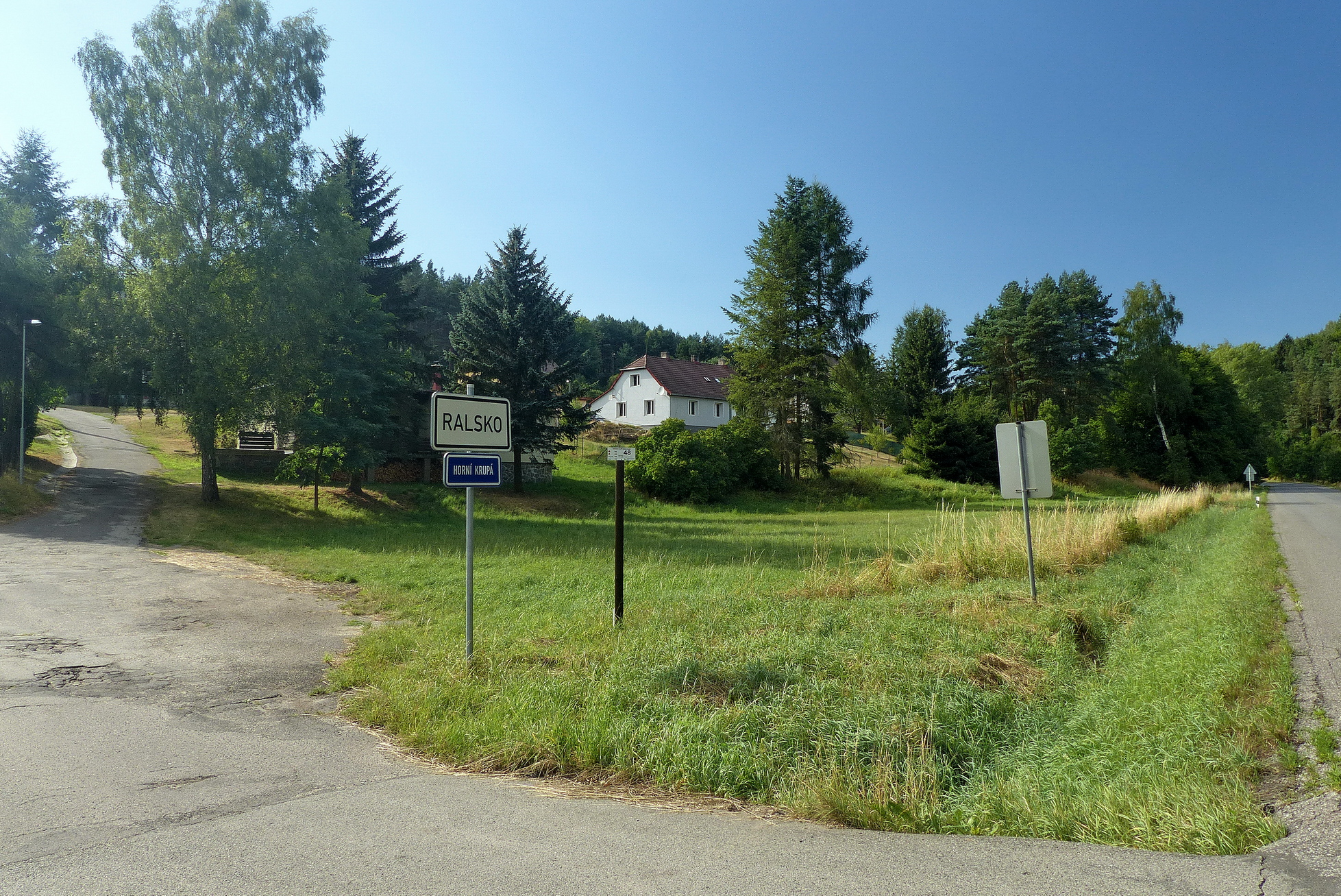 Horní Krupá (Ralsko) od silnice II/268